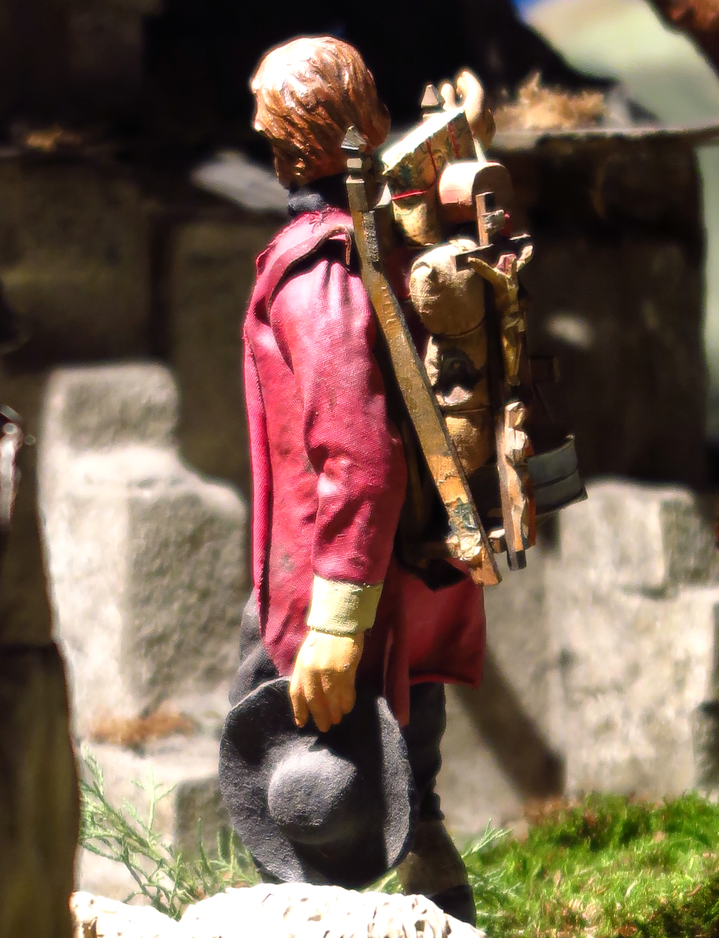 Ausschnitt aus der Münchner Stadtkrippe, ursprünglich angefertigt im Jahr 1954, Krippenfigur: Kraxenträger mit Kruzifix auf dem Rücken